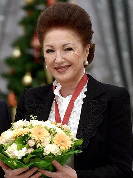 АДАМЯН Лейла Вагоевна – заместитель директора федерального государственного бюджетного учреждения «Научный центр акушерства, гинекологии и перинатологии имени академика В.И.Кулакова» на церемонии вручения государственных наград Российской Федерации 22 декабря 2014 года